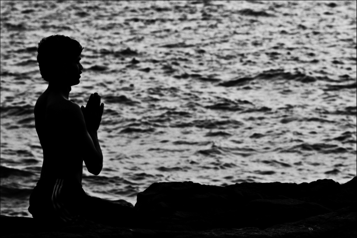 A man doing yoga on Palolem beach, Goa, India.